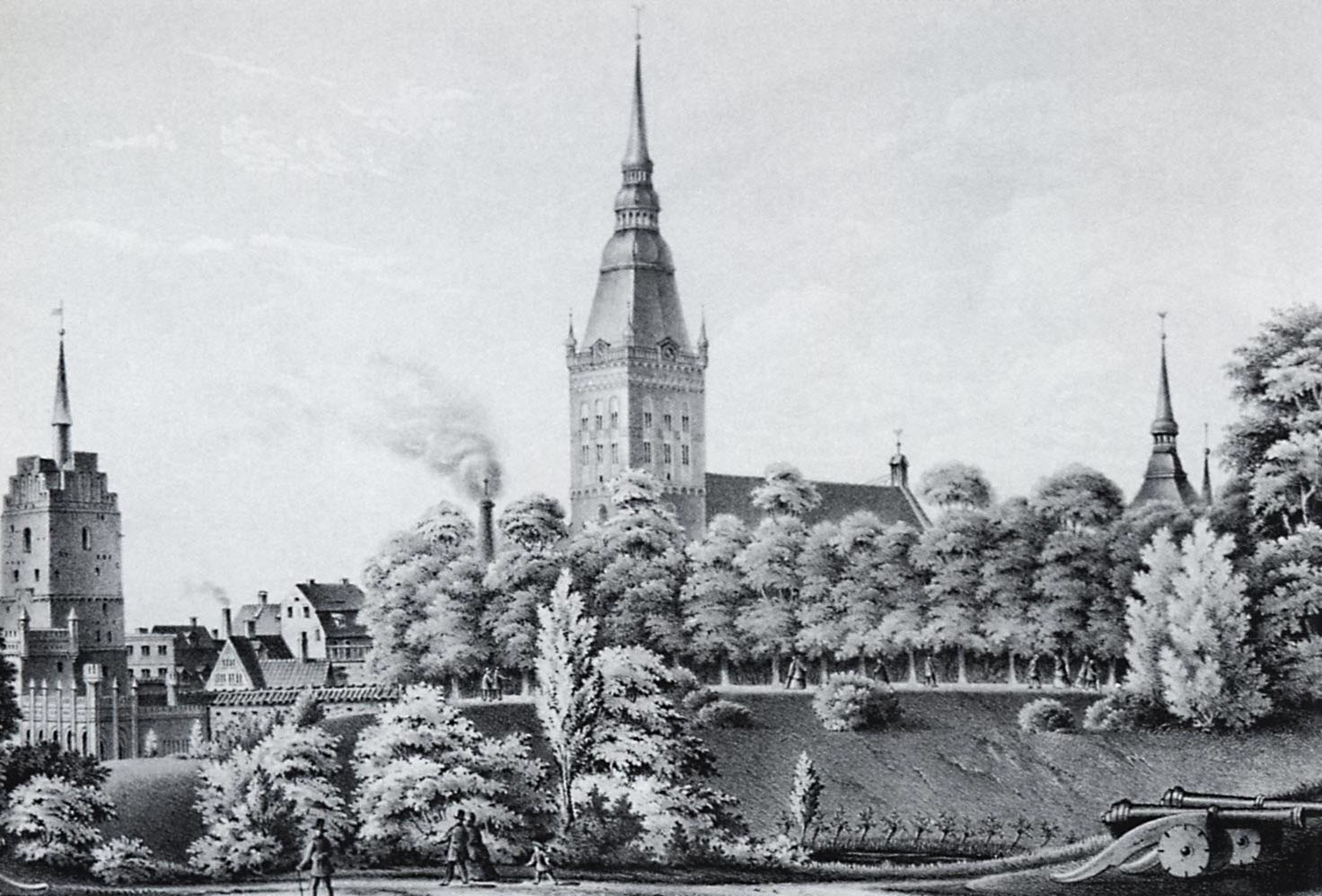 Dreiwallbastion und Kröpeliner Tor